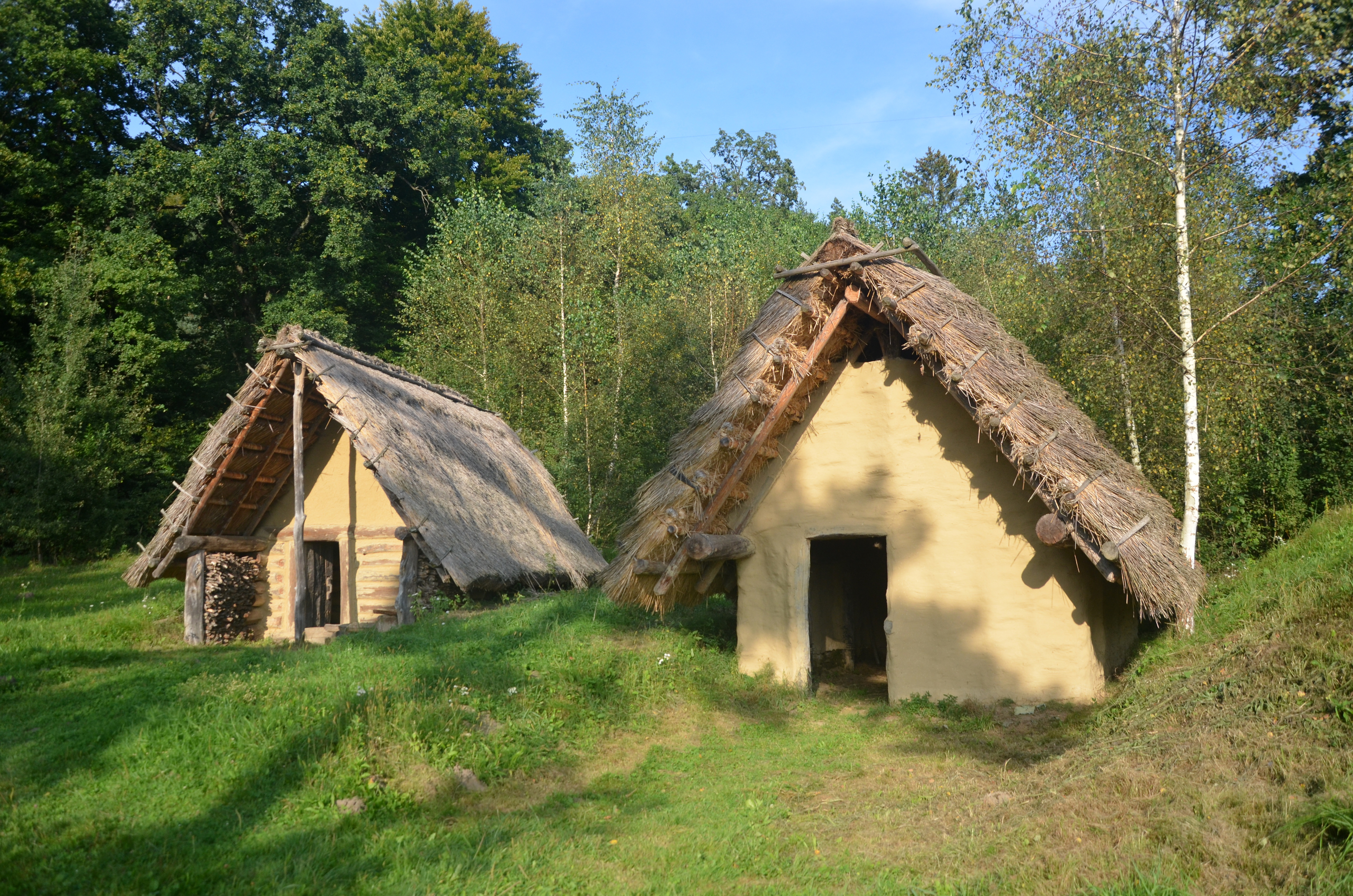 Rekonstruierte Eisenzeit-Hütte im keltischen Dorf am San in Sanok